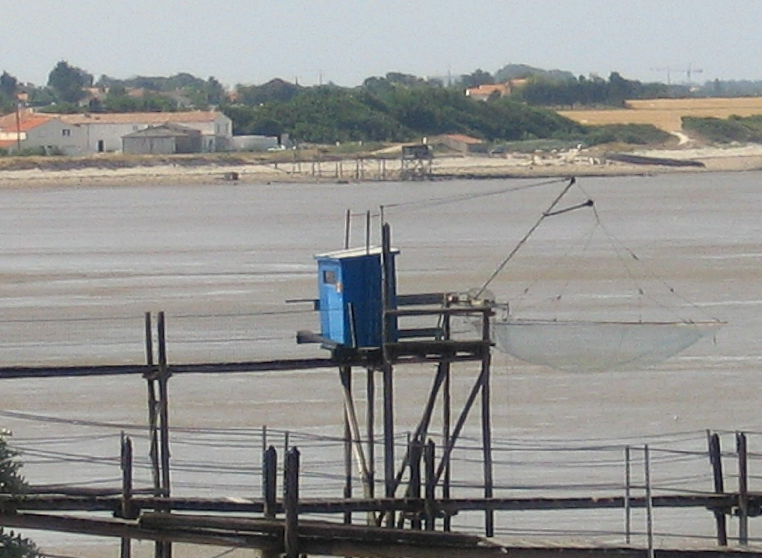 Cabane traditionelle de pêcheur à la pointe Saint-Clément en Charente-Maritime.